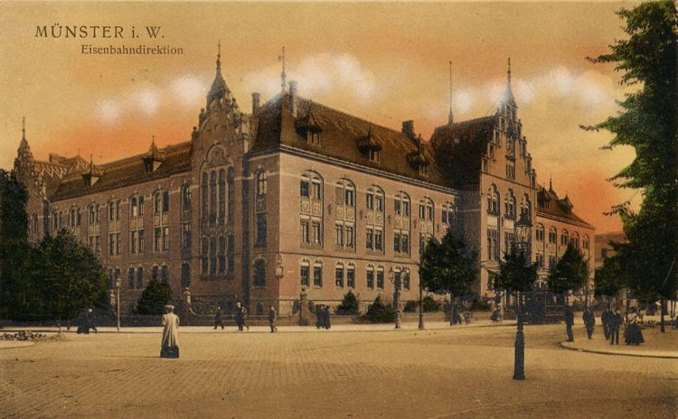 Verwaltungsgebäude der Königlichen Eisenbahndirektion Münster (nach 1920: Reichsbahndirektion Münster) in Münster (Westfalen)